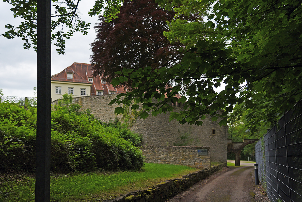 Schloss Harteneck bei Ludwigsburg von Osten